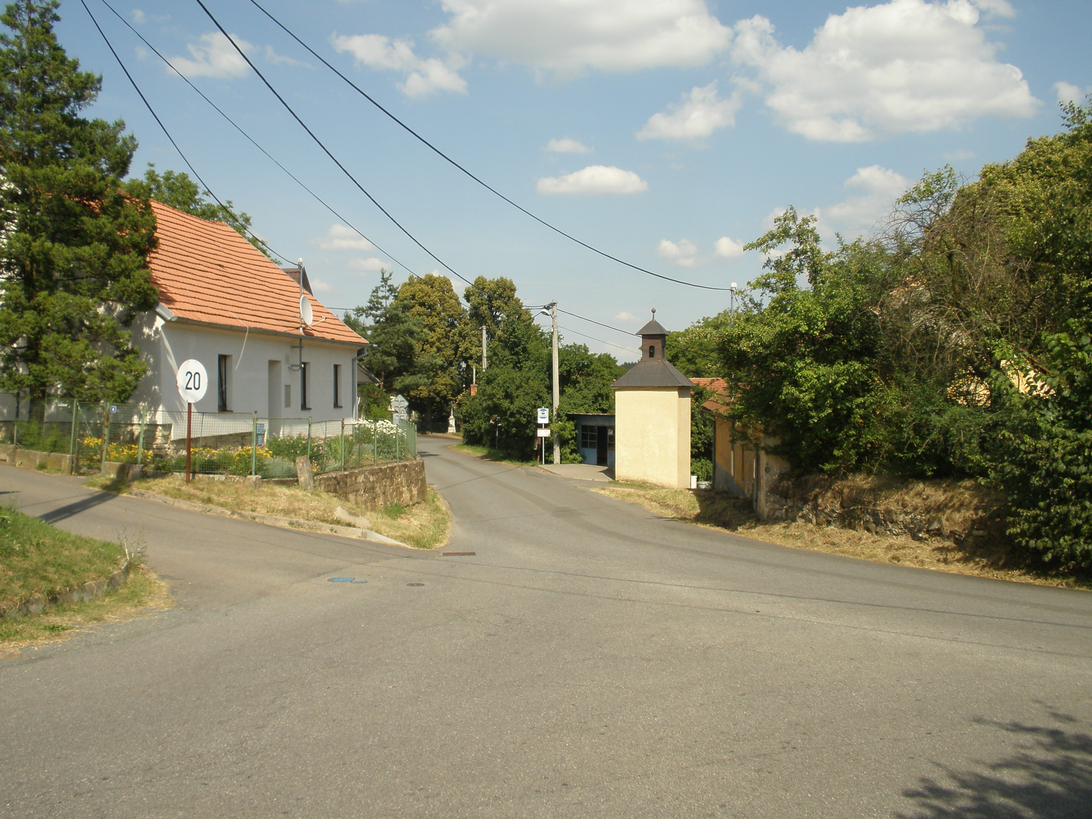 Zábludov